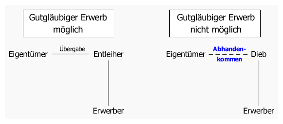 Grafik zum Abhandenkommen